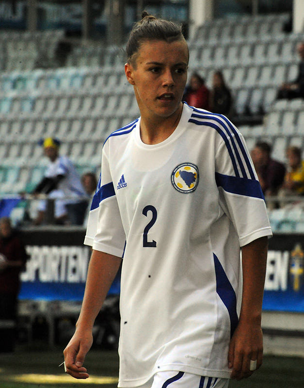 a_16_0697